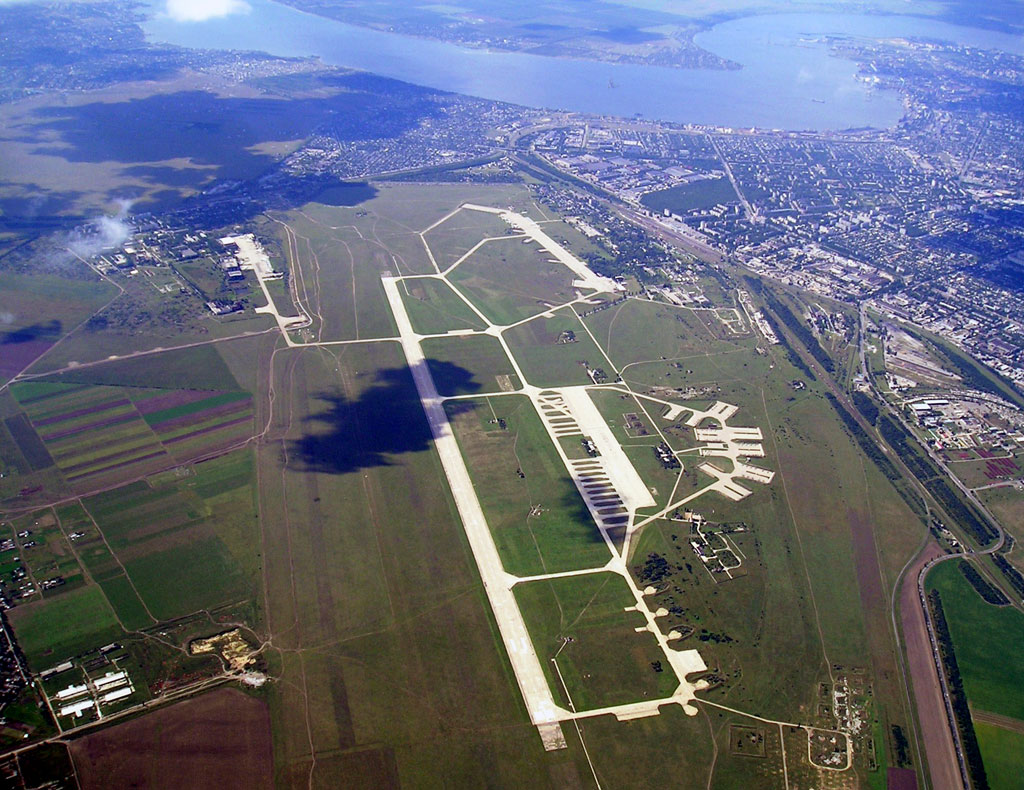 Авиабаза Кульбакино